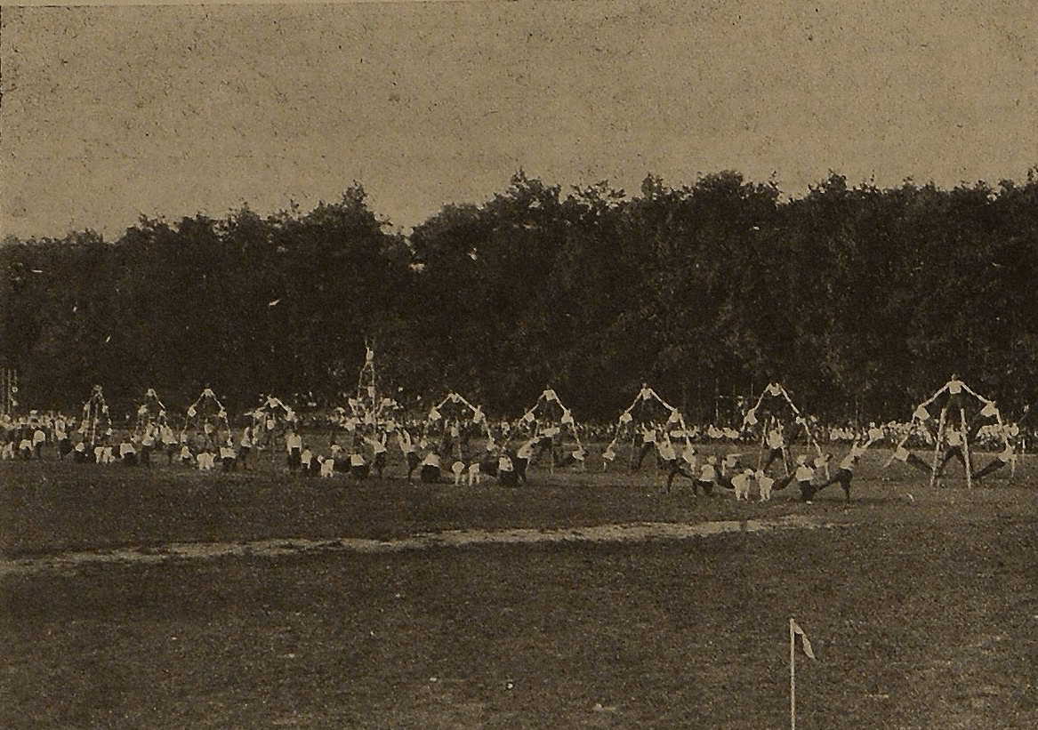 1923 Zlot Sokoła w Cieszynie Ćwiczenia wolne kobiet